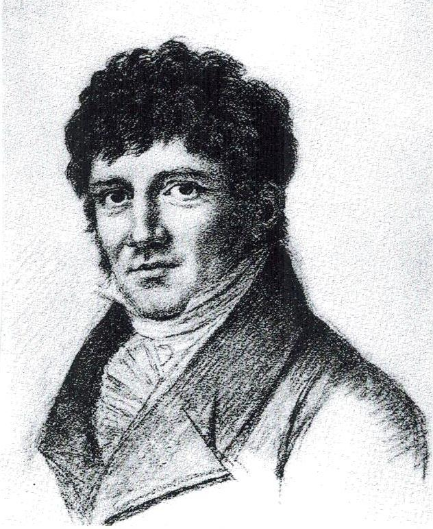 Friedrich Wilhelm Bessel (1784-1846), Astronom